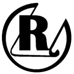 Vereins Logo RSV Rotation Greiz